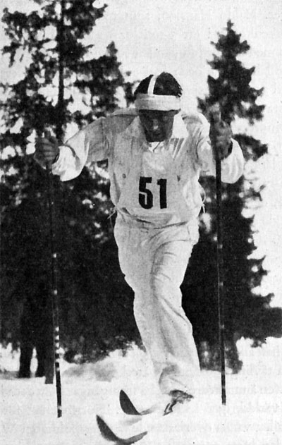 Arthur Häggblad. Skidåkare